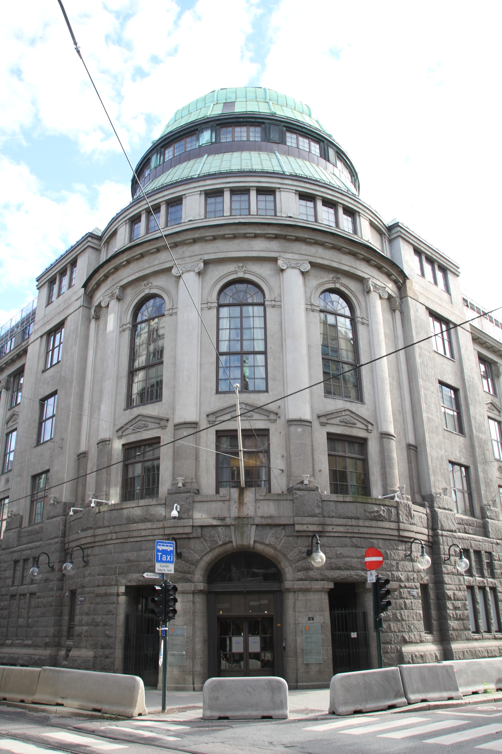 Den gamle Centralbanken er (2012-) kontorer for Kunnskapsdepartementet. Kirkegata, Oslo.